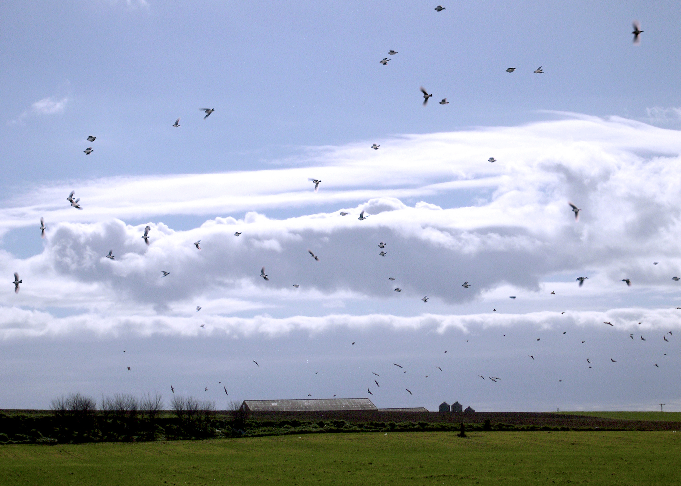 Calandrias en Invernada en la tierra de Medina del Campo (Valladolid, España)